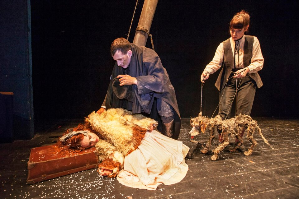 שחר רז בתפקיד הקברן בהצגה "אדם לא מת סתם"